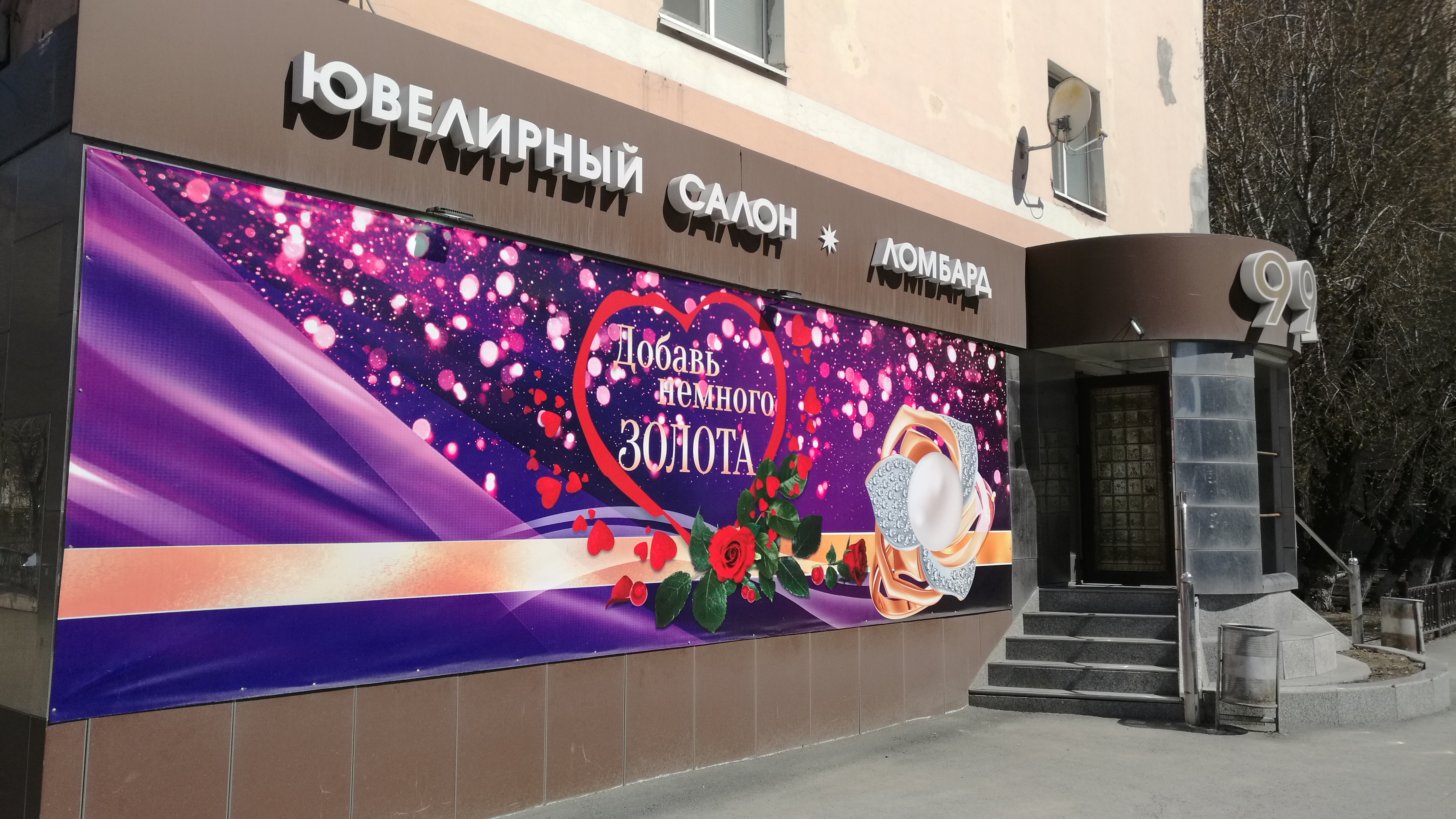 Strato Lenin. Tjumeno, Rusio.